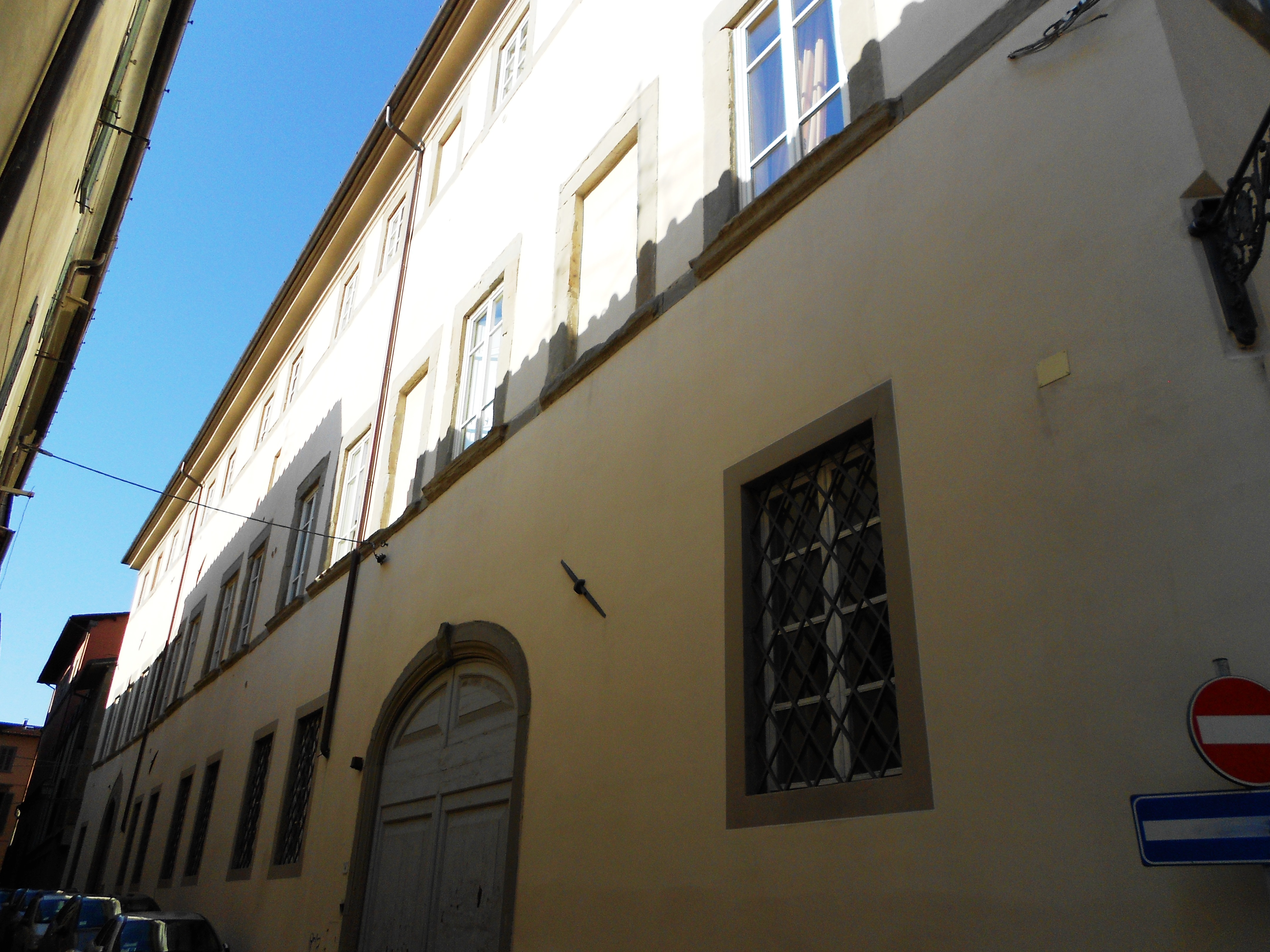 fotografia Palazzo Banchieri via Amati